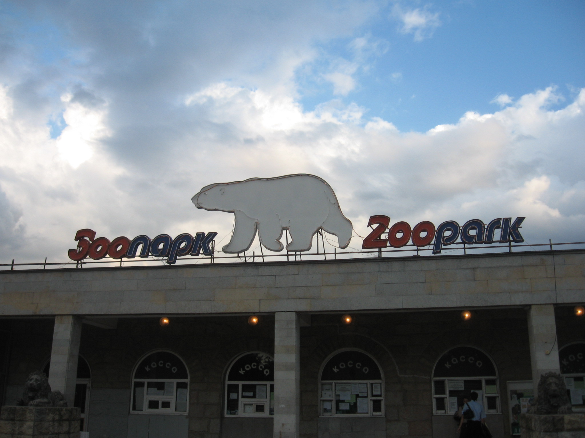 Leningradi loomaaia sissekäik